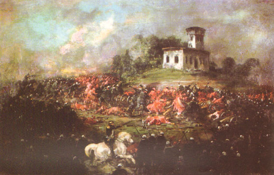 Escena histórica que representa un campo de batalla. Encuentro de adversarios donde sobresale la figura de Bartolome Mitre uniformado montado en un caballo blanco, espada en mano, dando órdenes a la tropa. En el angulo superior derecho, una casa con una pequeña torre (mirador). Pieza perteneciente al Museo Mitre